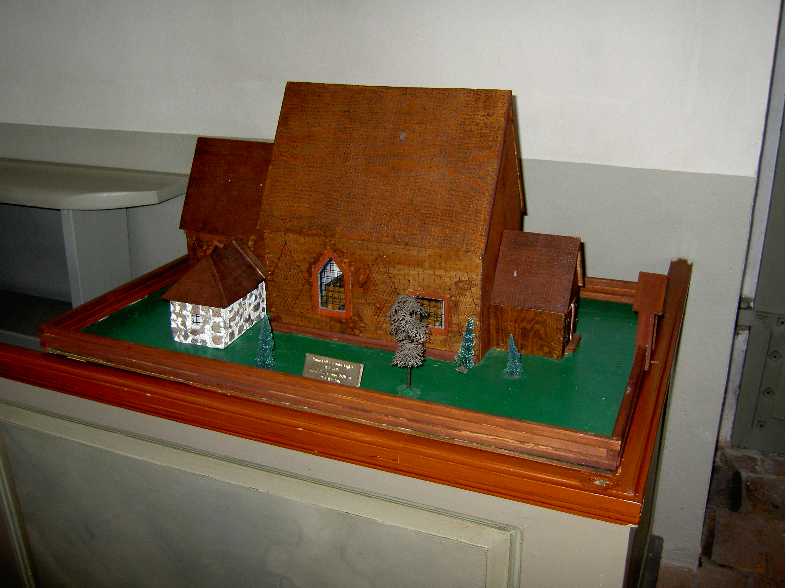 Modell av tidigare träkyrka i Rumskulla